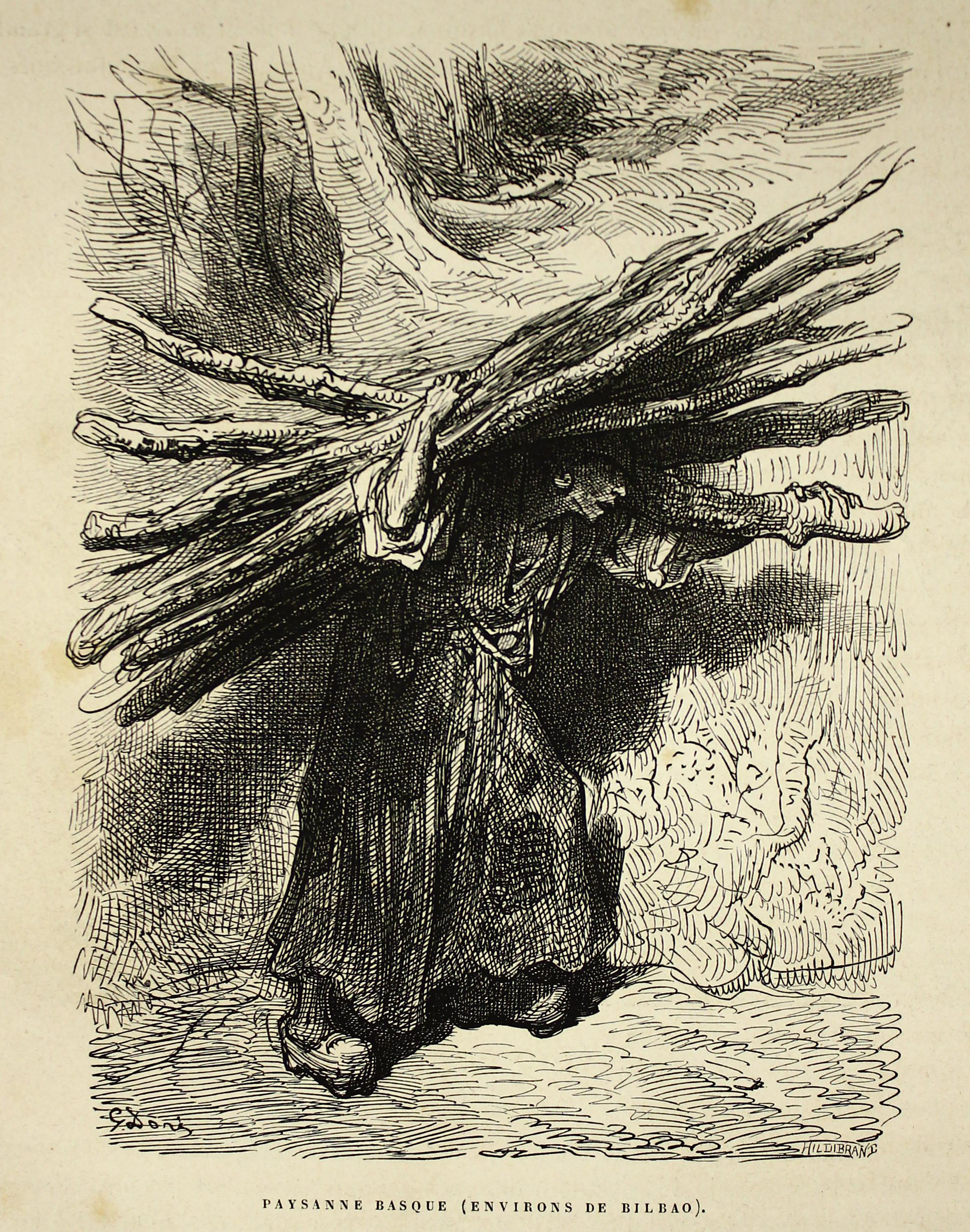 Autor: Davillier, Jean Charles, barón, 1823-1883 Descripción bibliográfica: L'Espagne / par Le Baron CH. Davillier ; ilustrée de 309 gravures dessinées su bois par Gustave Doré. - Paris : Librairie Hachette, 1874. - 799 p. : il. Materia: España- Geografía Materia: España- Usos y costumbres Ilustrador: Doré, Gustave, 1832-1883 Editor: Libreria Hachette Lugar de impresión: Francia, París Localización: Libro completo